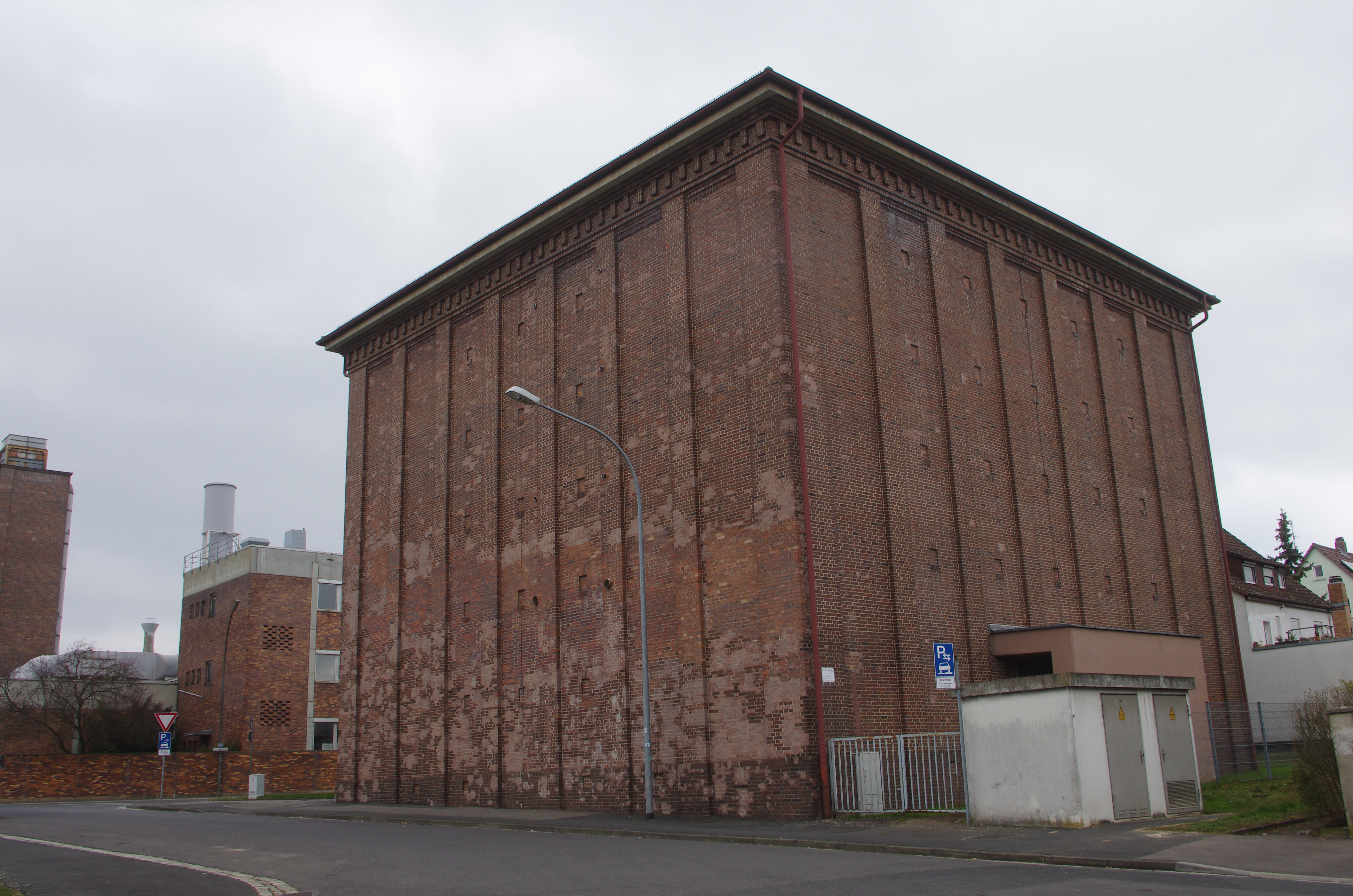 Fichtel-und-Sachs-Bunker, Schweinfurter Straße 73, Schweinfurt-Oberendorf, Germany Rückseite